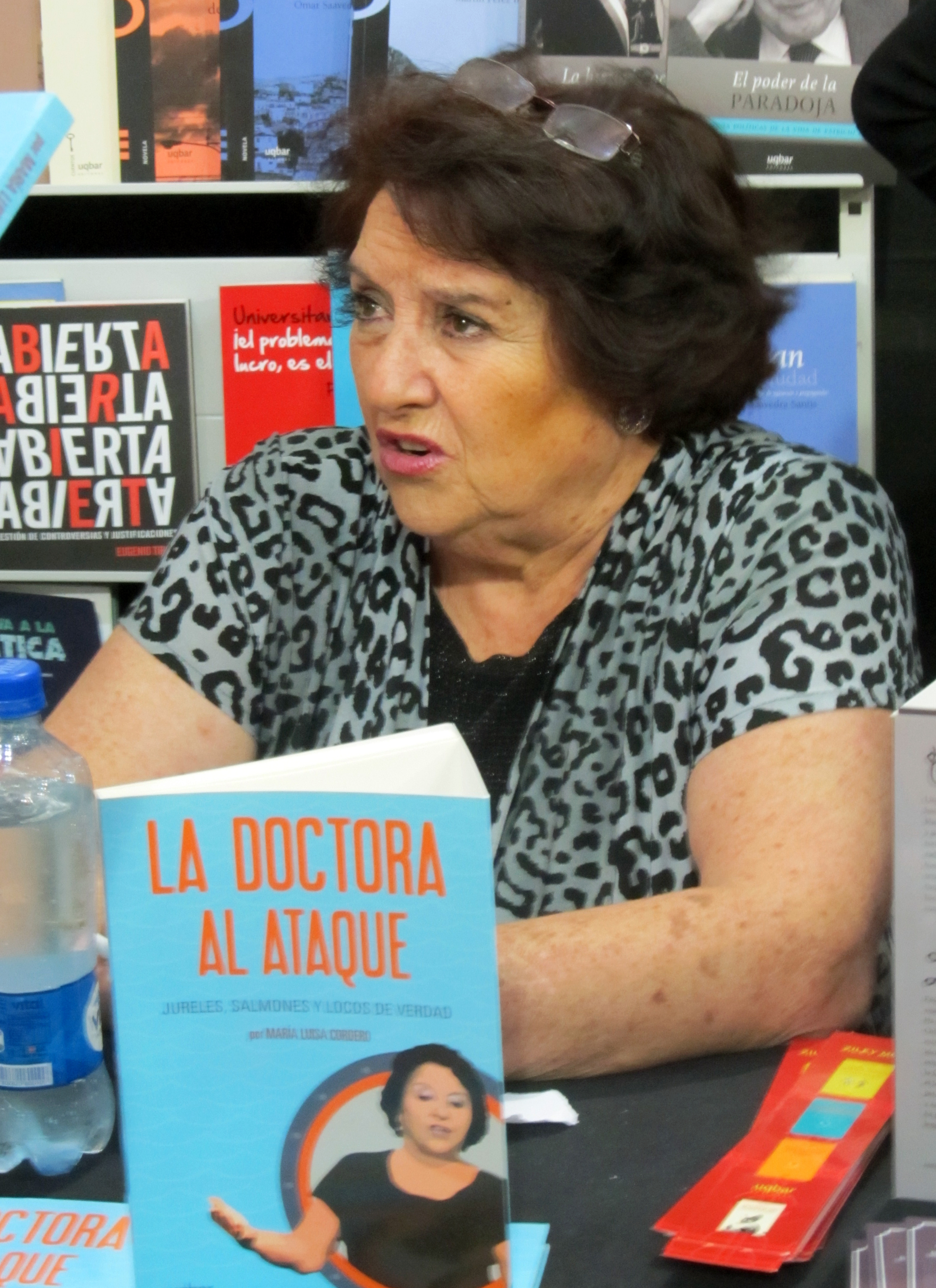 María Luisa Cordero firmando su libro en FILSA 2014.